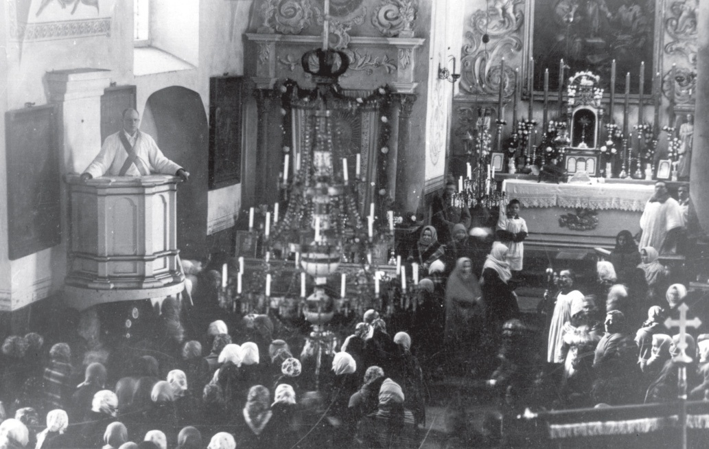 Айцец В. Гадлеўскі падчас імшы ў Жодзішскім касцёле. Сярэдзіна 1920-х гадоў. БДАМЛіМ